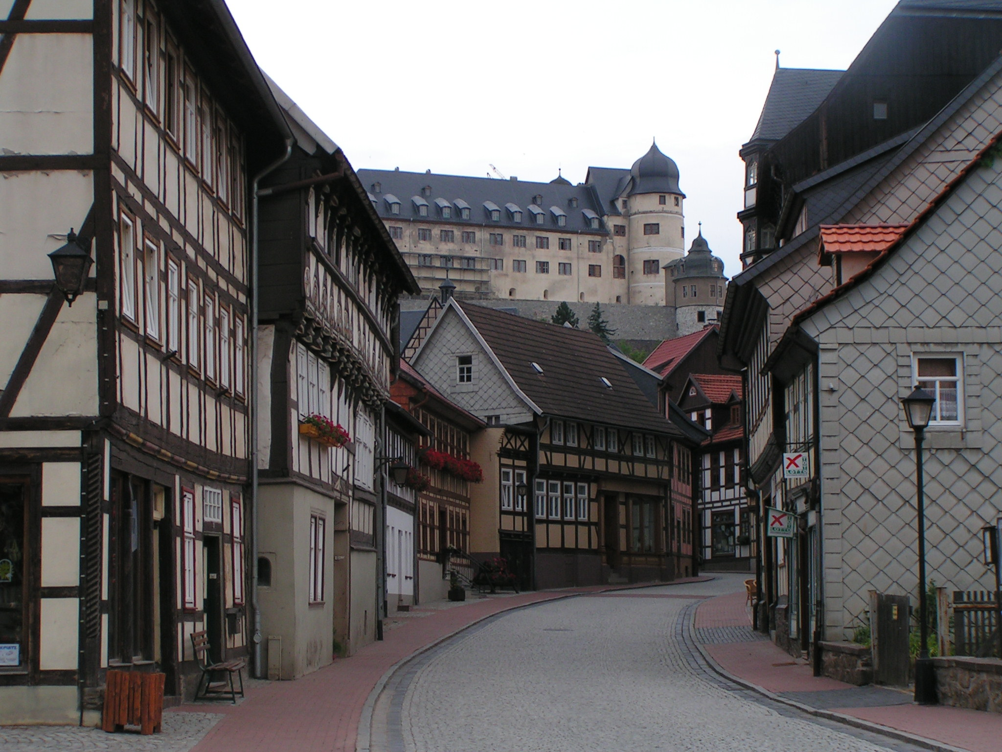 Stolberg/Harz: Altstadt und Schloss